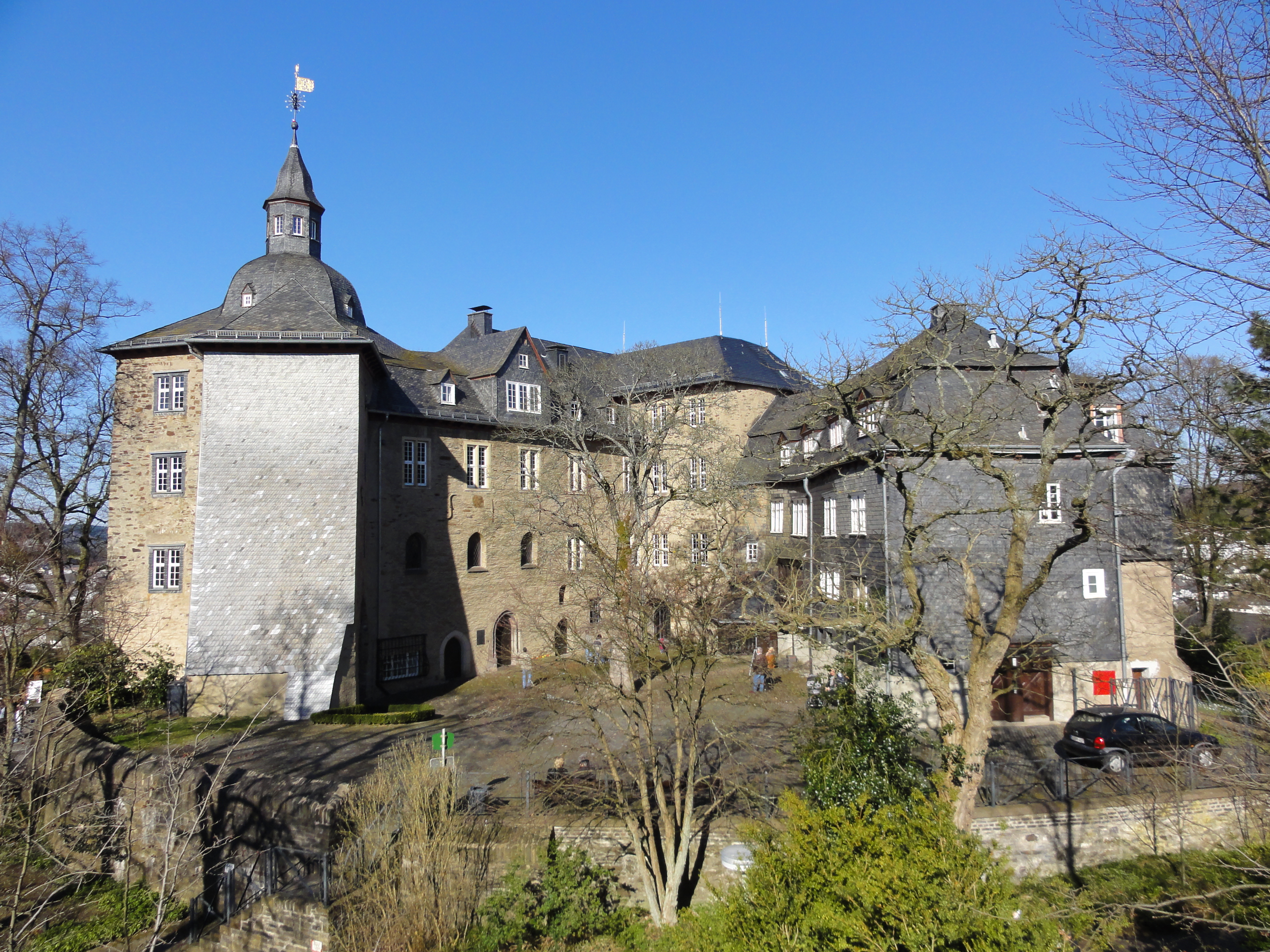 Siegen Schloss - 20.3.2011